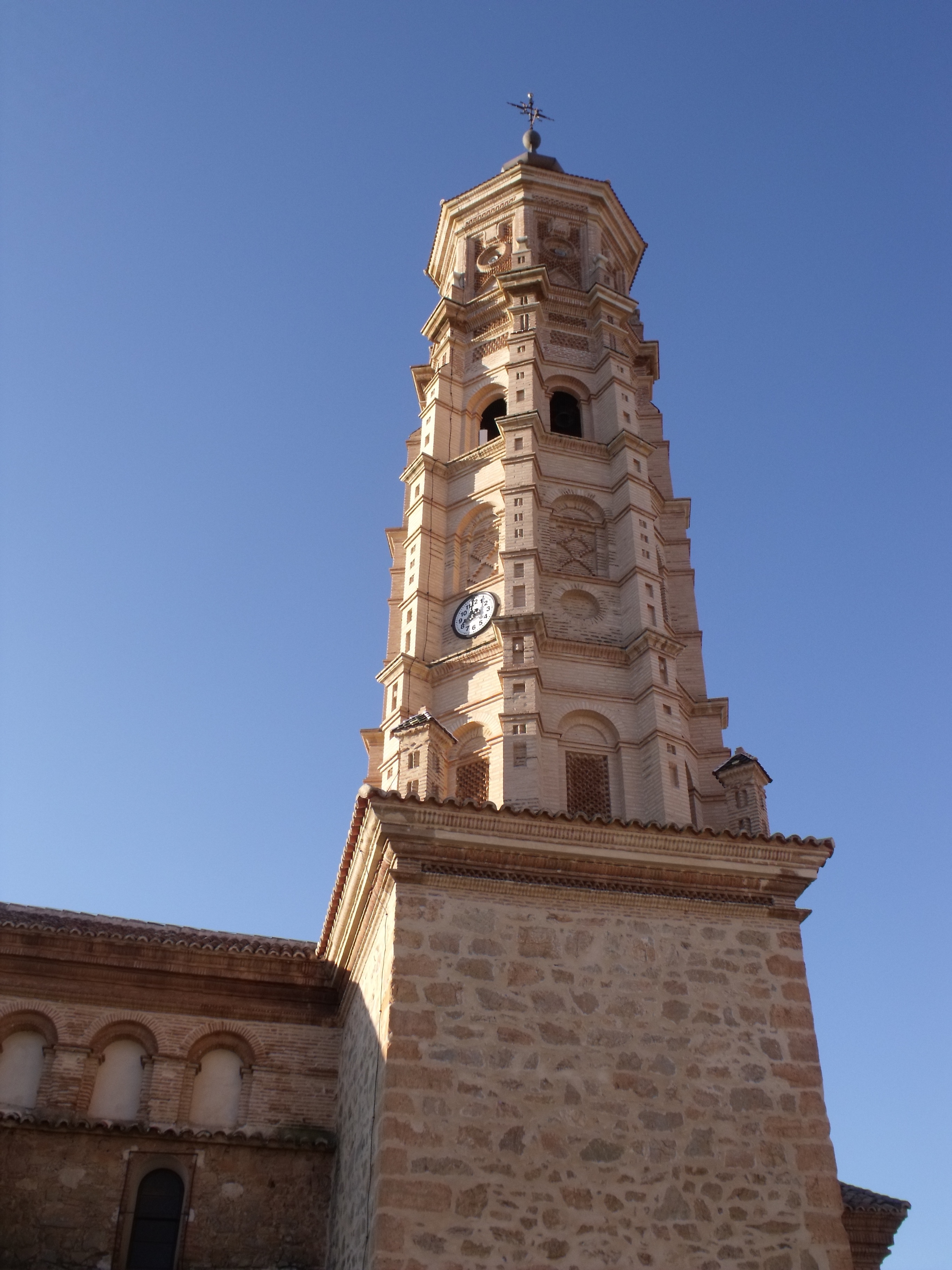 San Martín del Río